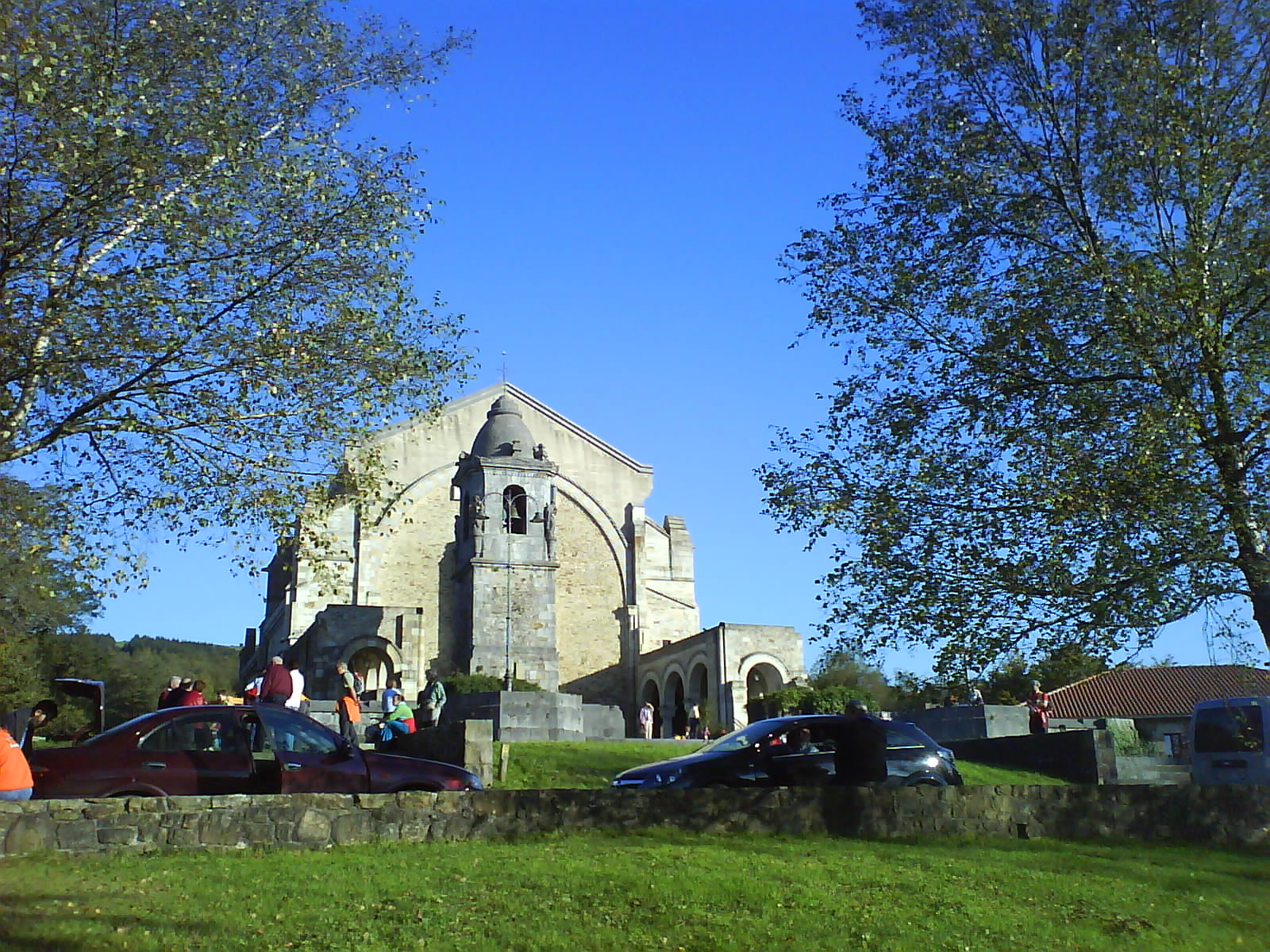 Santuario de los santos Antonios de Urkiola, Abadiano , Vizcaya, País Vaco, España.